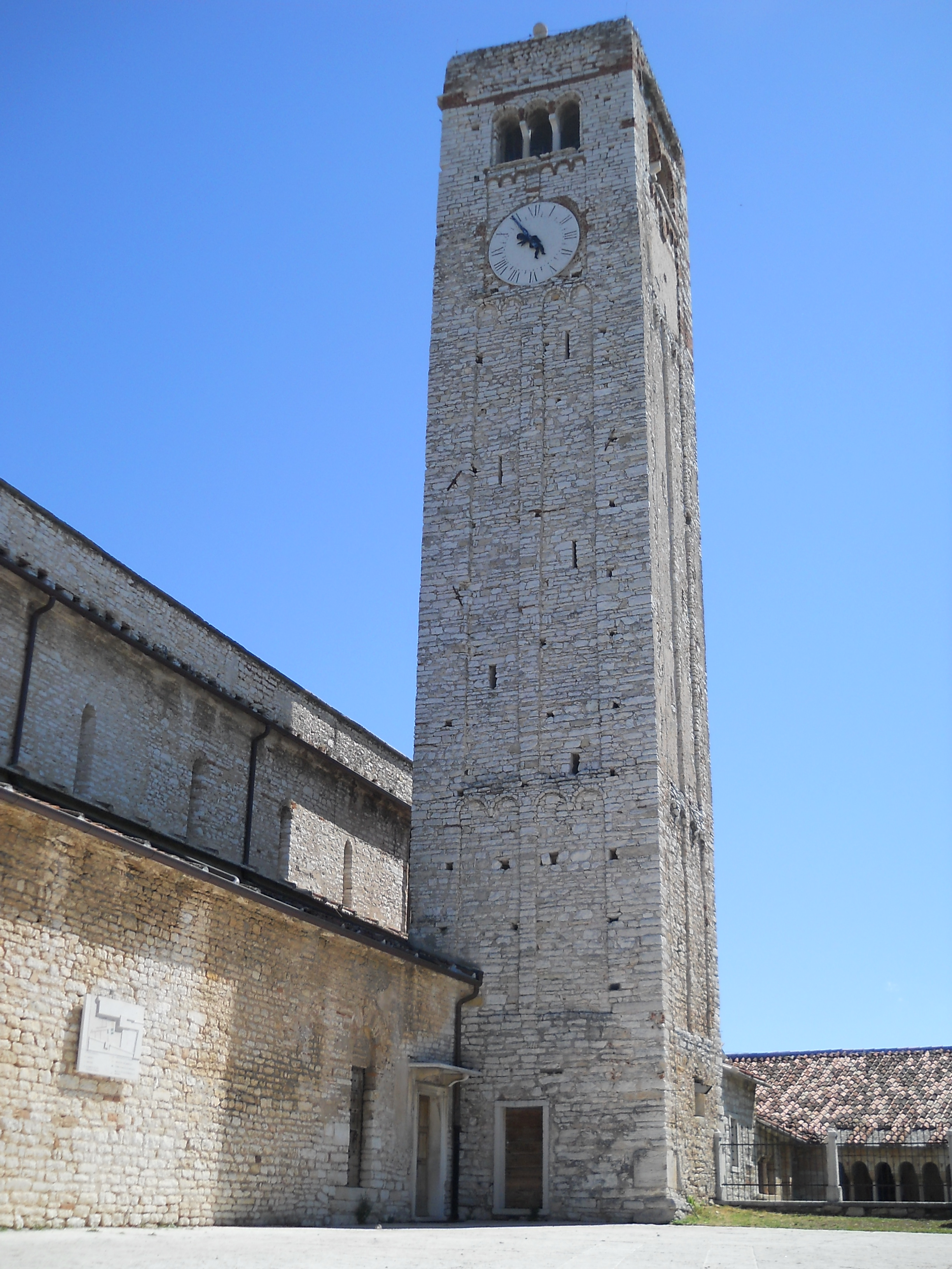 Torre campanaria della Pieve di San Giorgio di Valpolicella